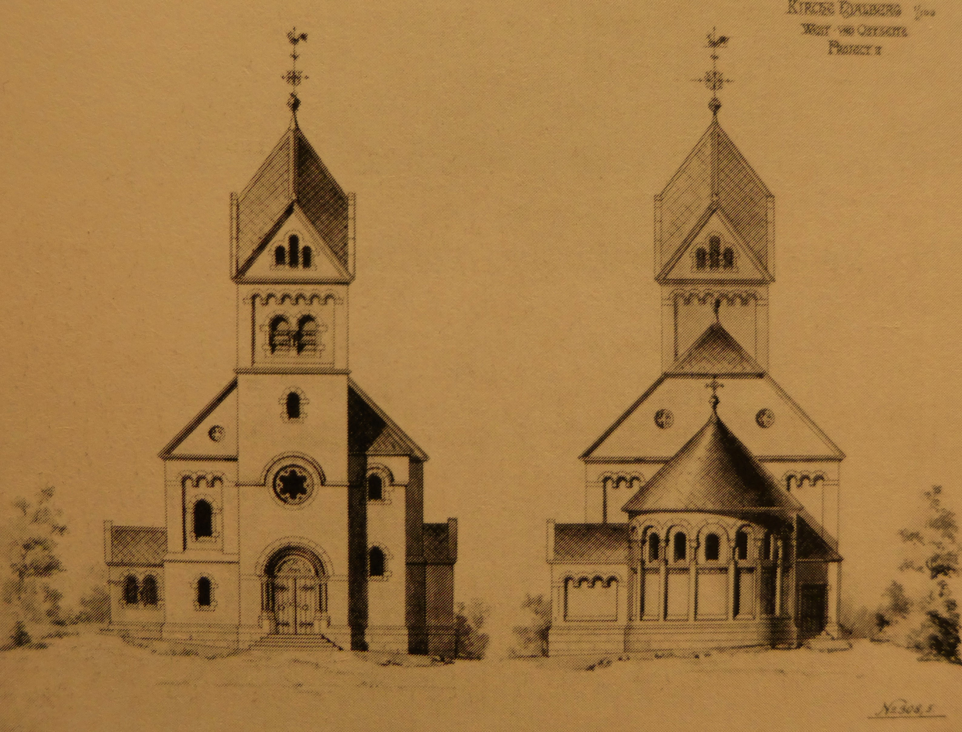 Stumm-Kirche, Neoromanischer Entwurf, Apsis und Front